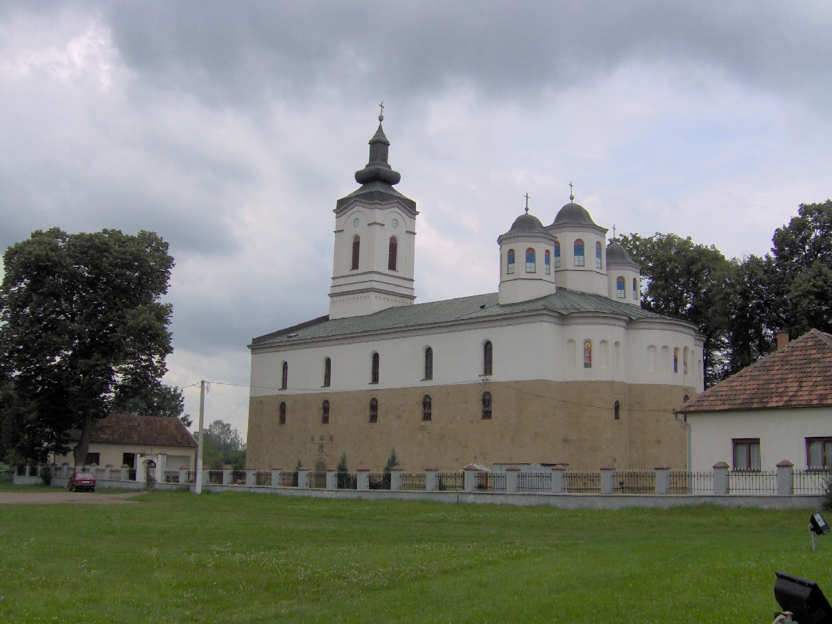 CRKVA ROĐENJA PRESVETE BOGORODICE - ЦРКВА РОЂЕЊА ПРЕСВЕТЕ БОГОРОДИЦЕ